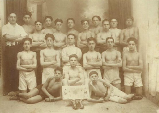 Club pugilistique du Maccabi à Tunis. En pull-over blanc, Joe Guez. Devant lui, Edmond Zerbib.